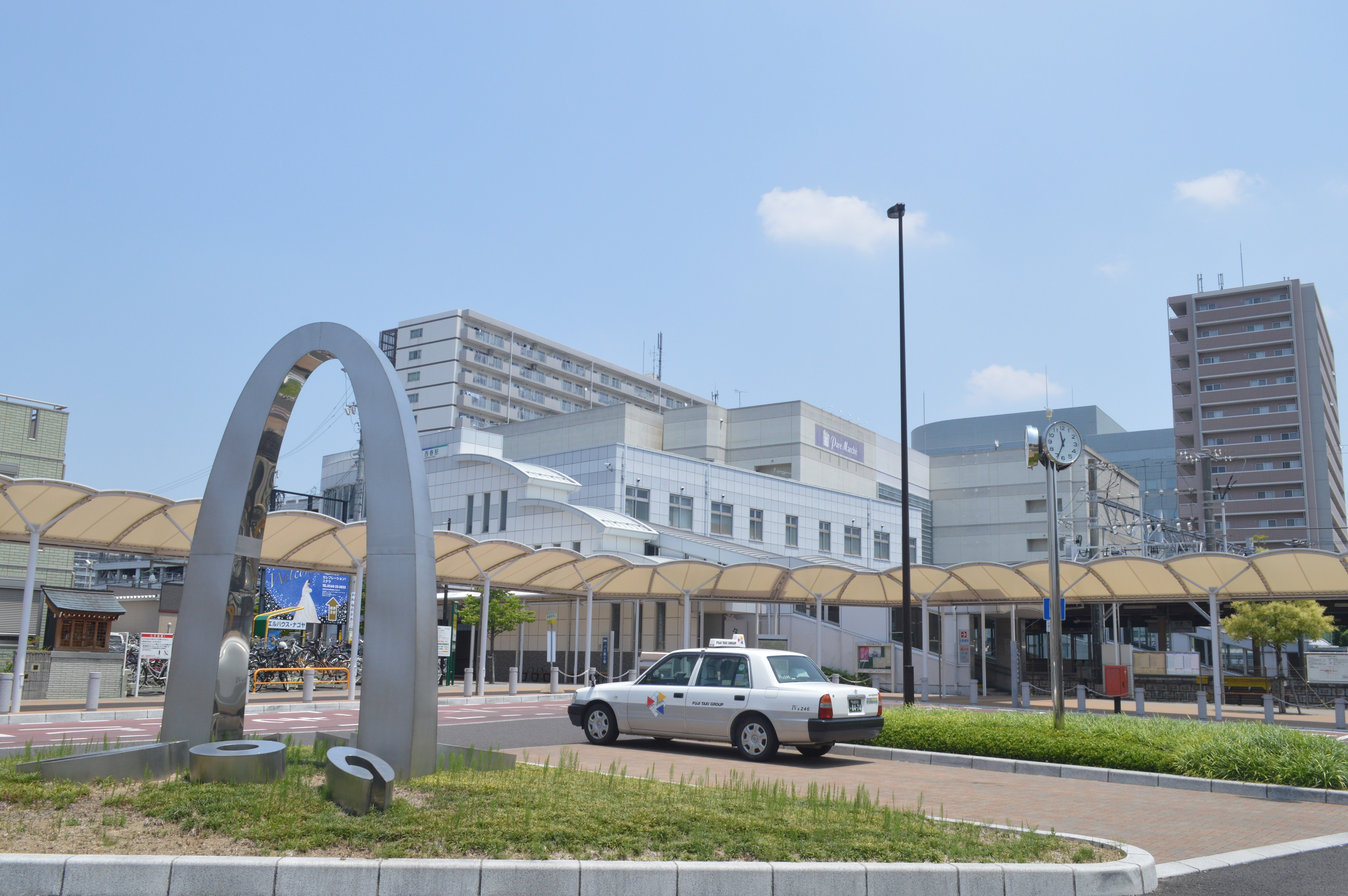 愛知県北名古屋市。名鉄犬山線西春駅西口。